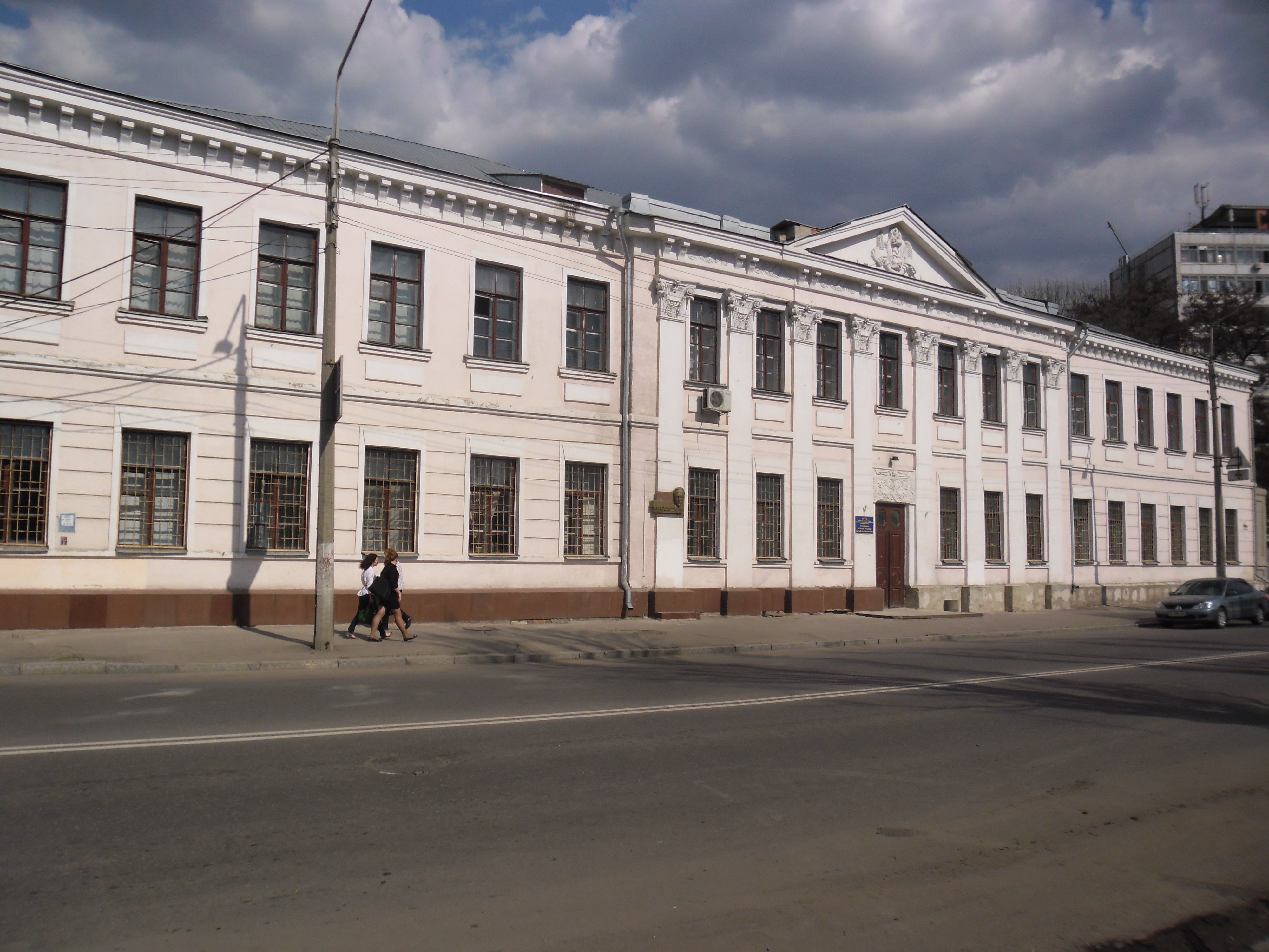 Харьковское музыкальное училище им. Б.Н.Лятошинского.